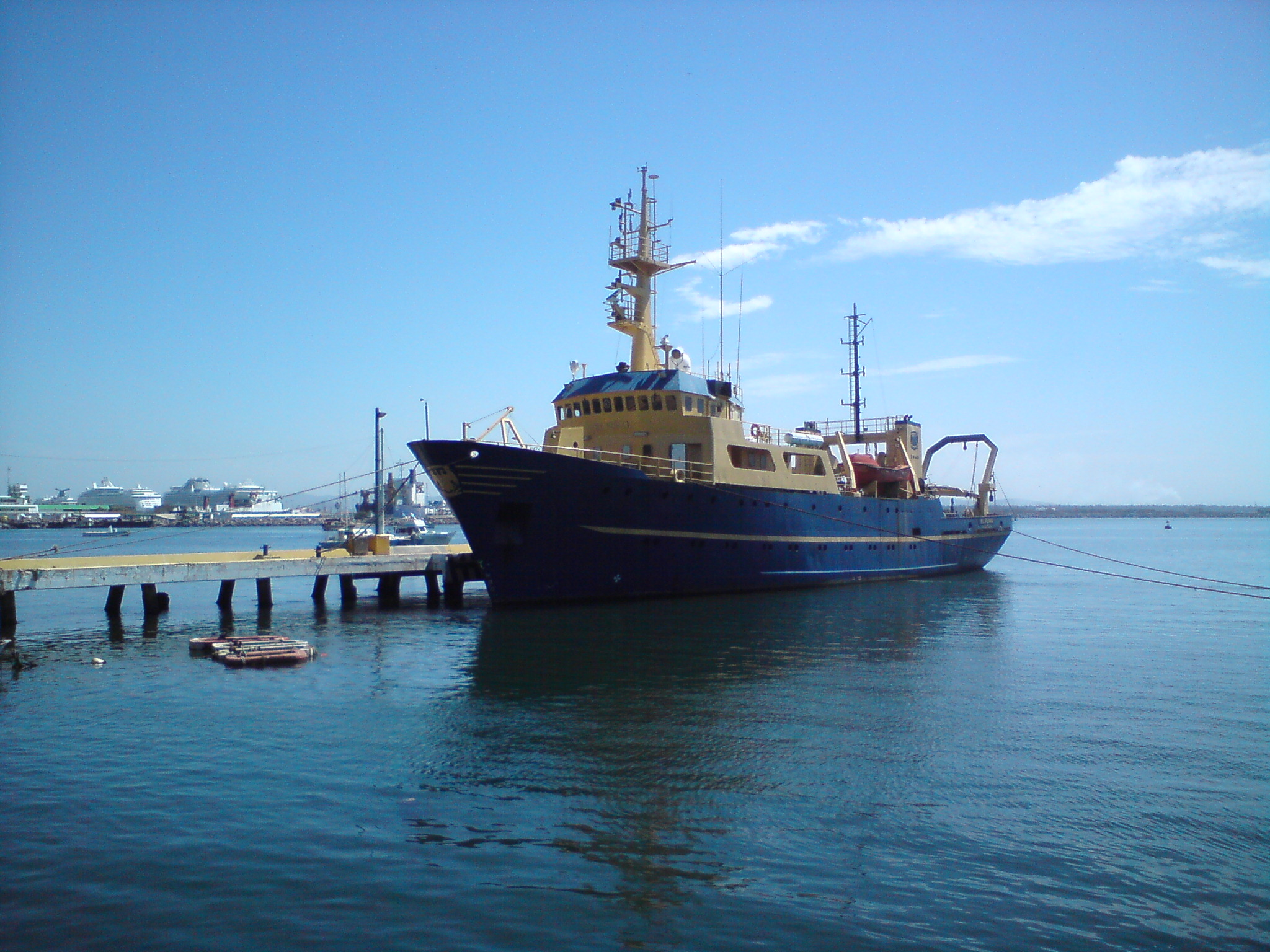 Buque de investigacion oceanografica de la UNAM IMO Number: 7925132 MMSI Number: 345080008 Callsign: XCUM Length: 30 m Beam: 70 m